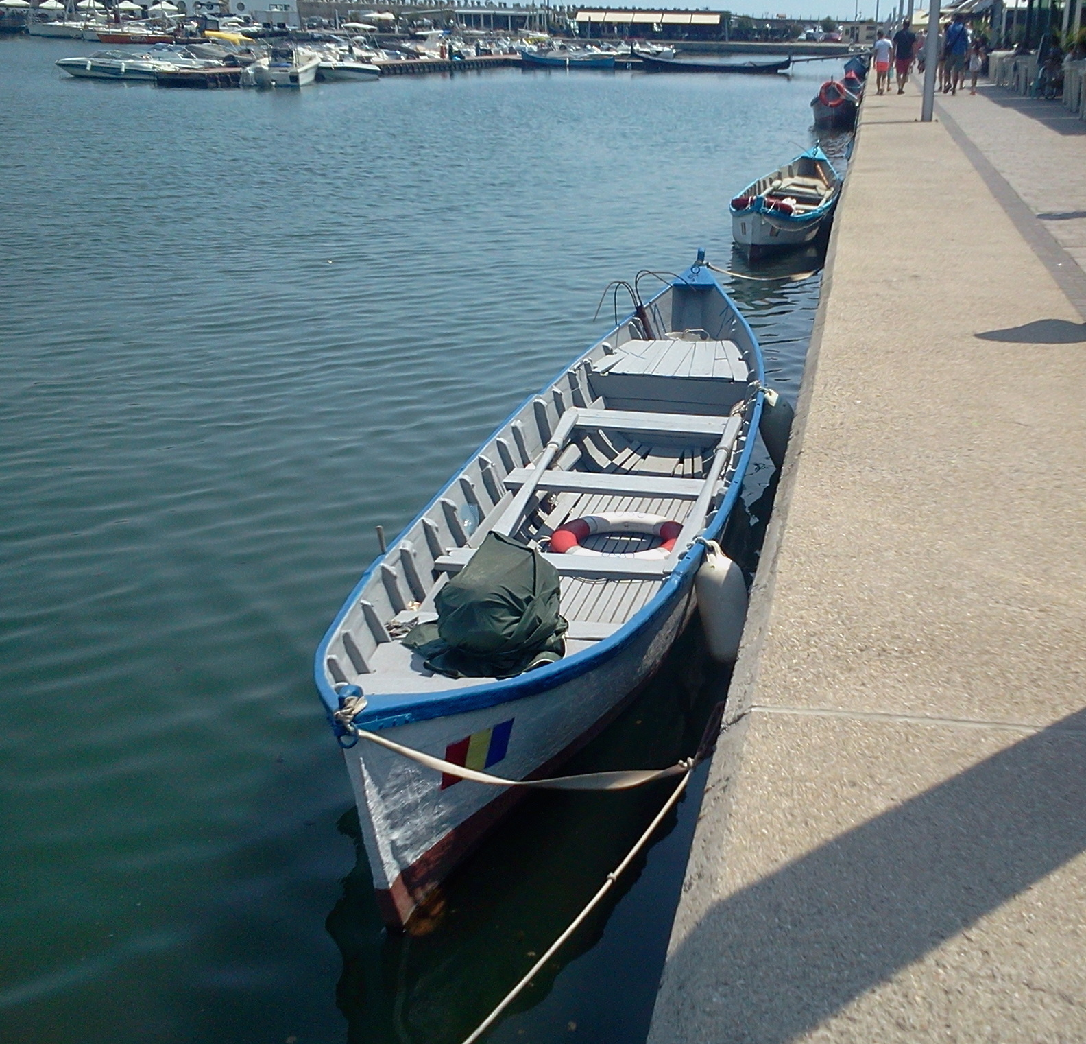 Constanța 2017: portul turistic Tomis, lotcile de pescuit